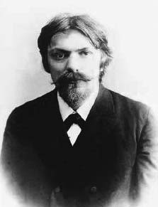 František Lexa (1876 - 1960), Český egyptolog.